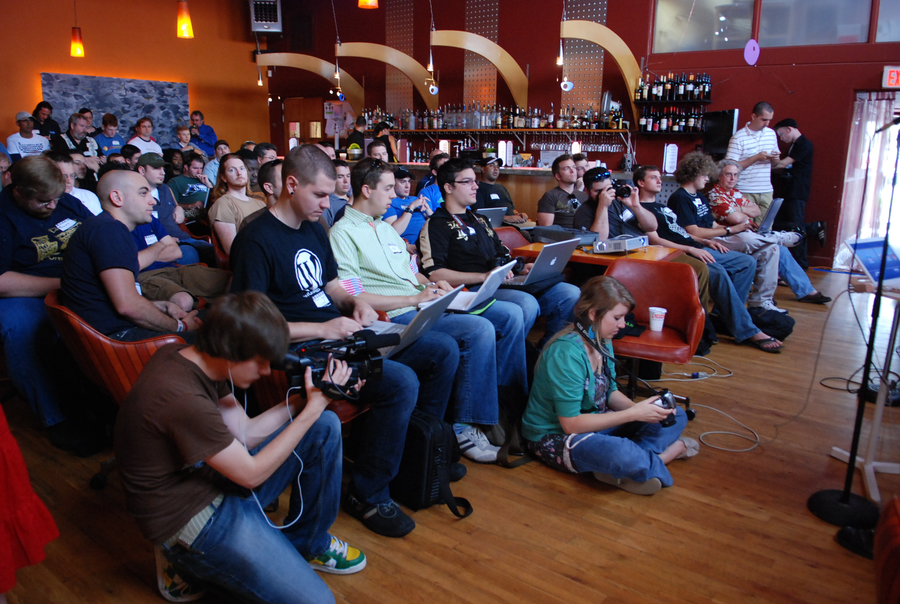 Teilnehmer einer Session eines BarCamps in Orlando